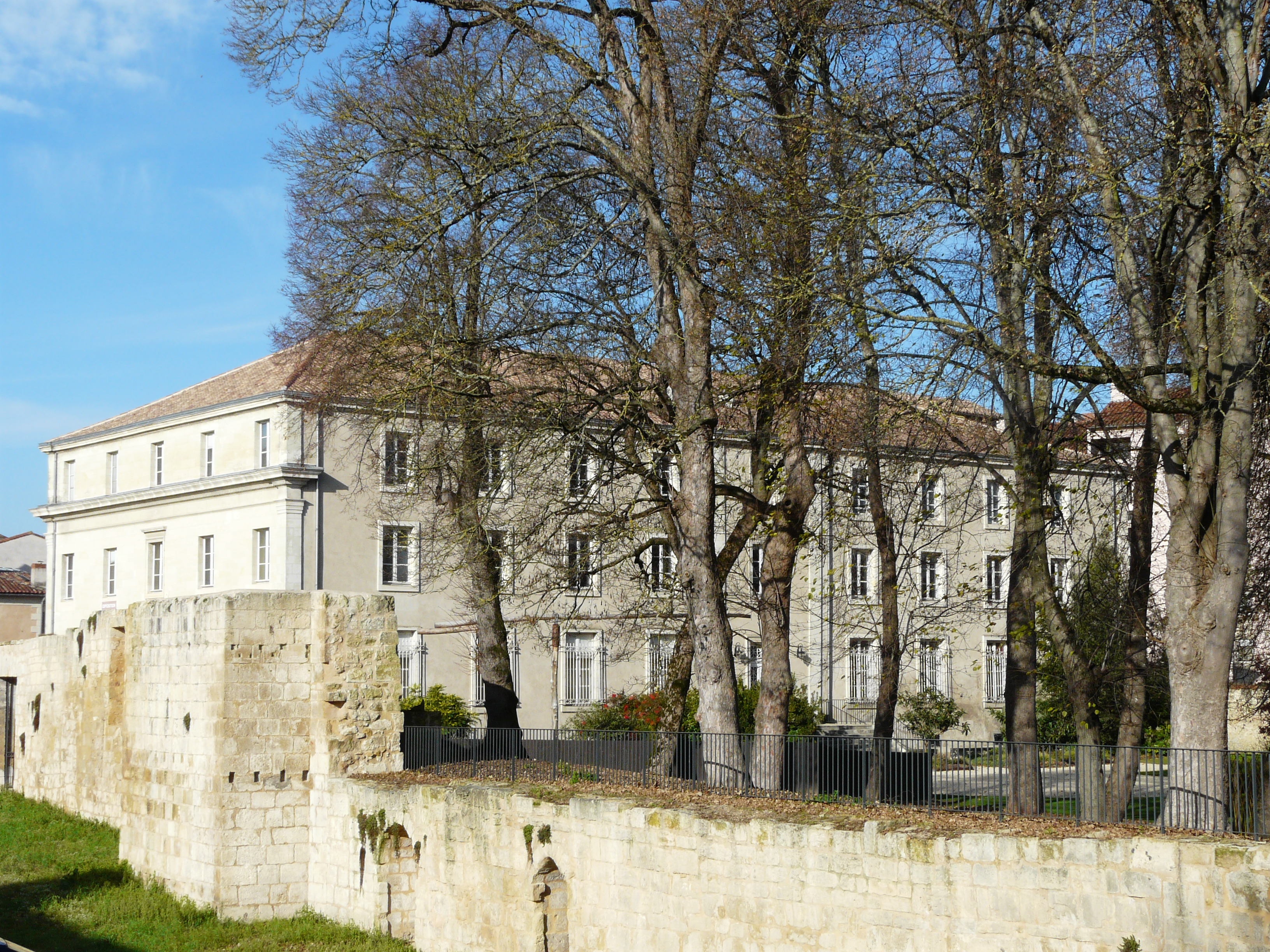 L'espace culturel François Mitterrand vu du sud-est, Périgueux, Dordogne, France.